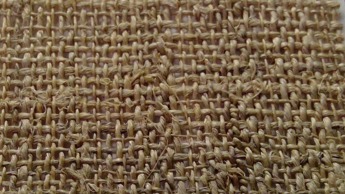 京都府宮津市上世屋地区にのみ残る伝統の織物